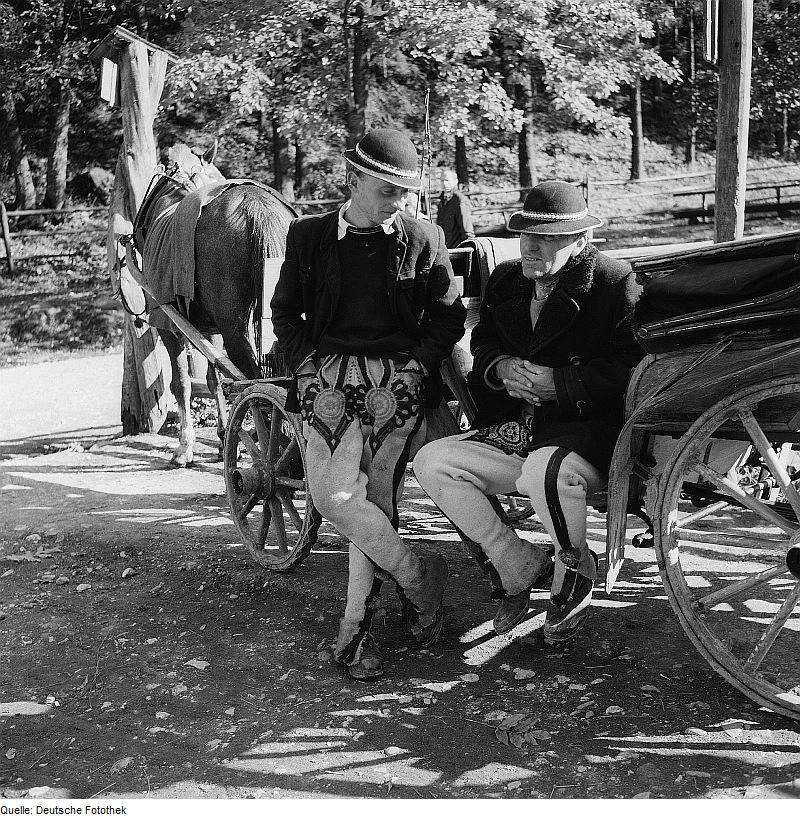 Original image description from the Deutsche FotothekZakopane. Zwei Kutscher an einer Pferdekutsche